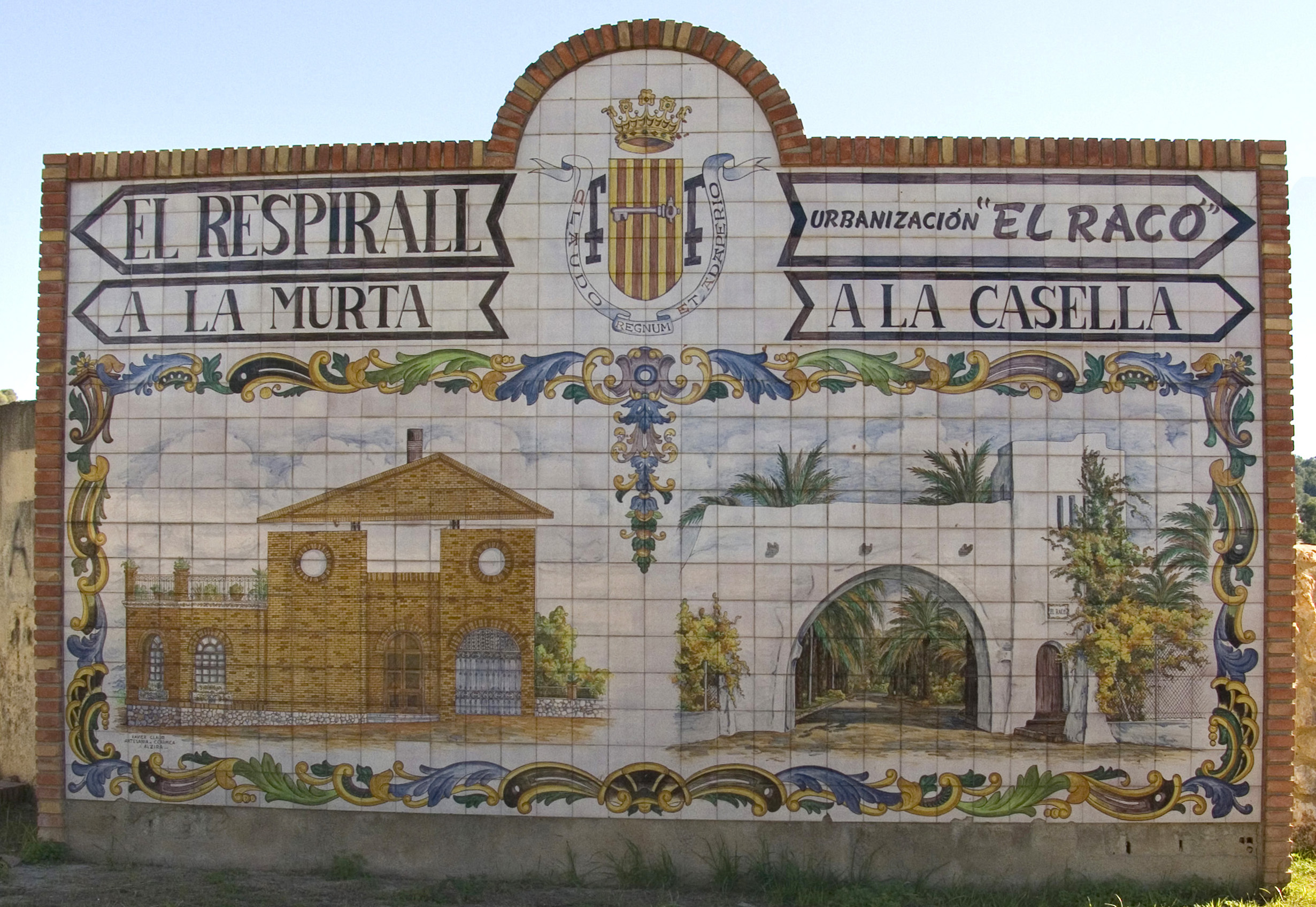 Senyal situada a Alzira (País Valencià)